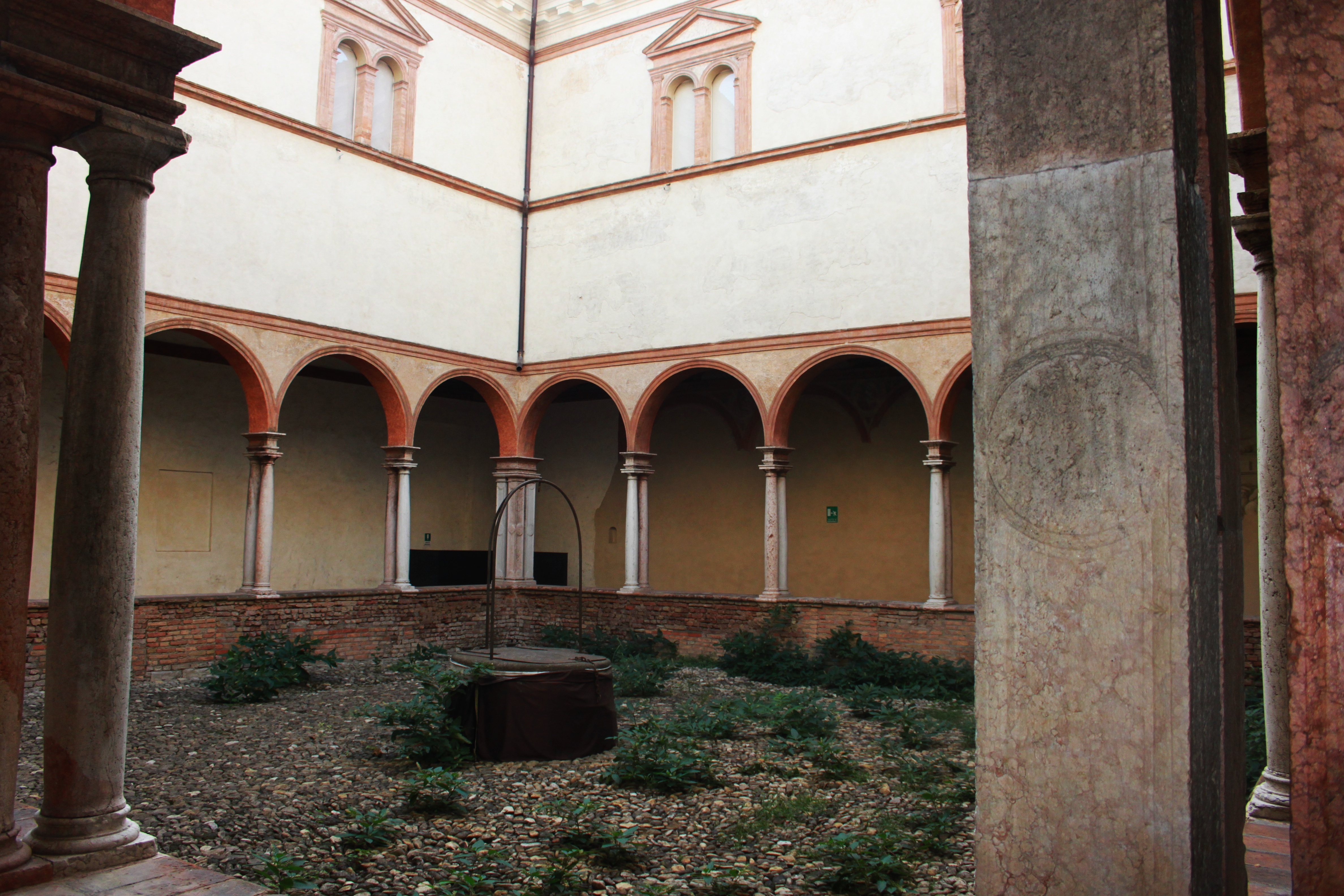 Chiostri di San Pietro This is a photo of a monument which is part of cultural heritage of Italy.